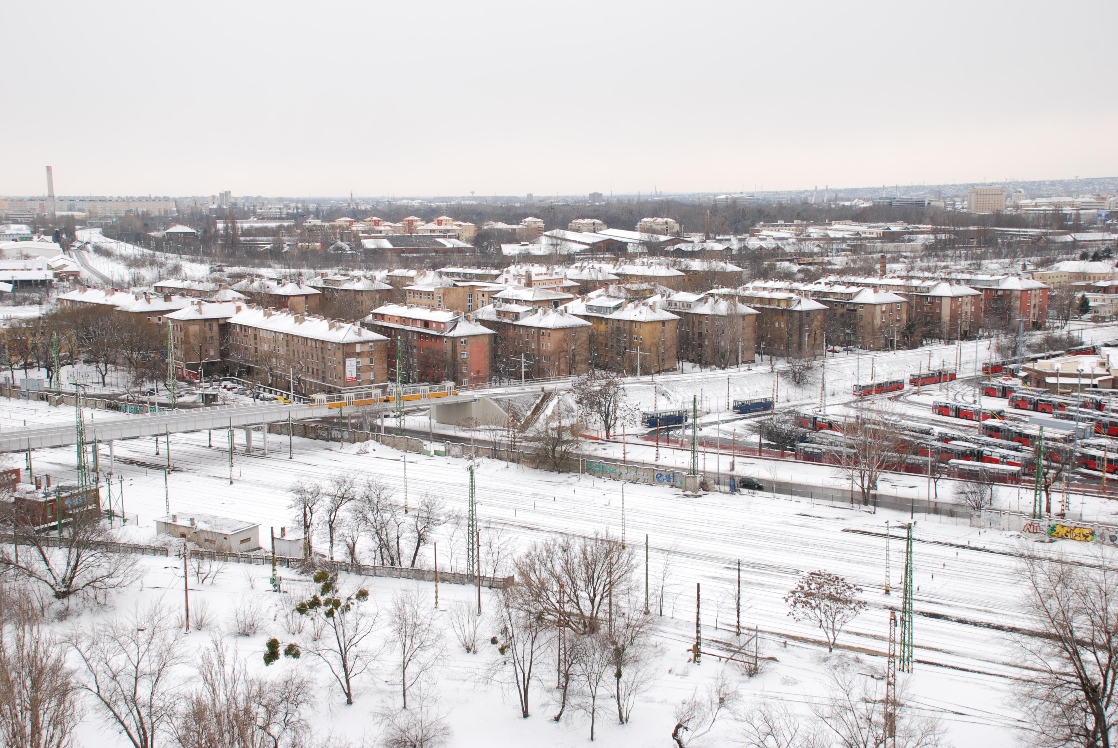 Budapest, Pongráctelep látképe északkeletről. Előtérben a MÁV Kőbánya-alsó pályaudvar, 37-es villamos, BKV Kőbányai Garázs. Háttérben a MÁV Északi Járműjavító, Népliget.